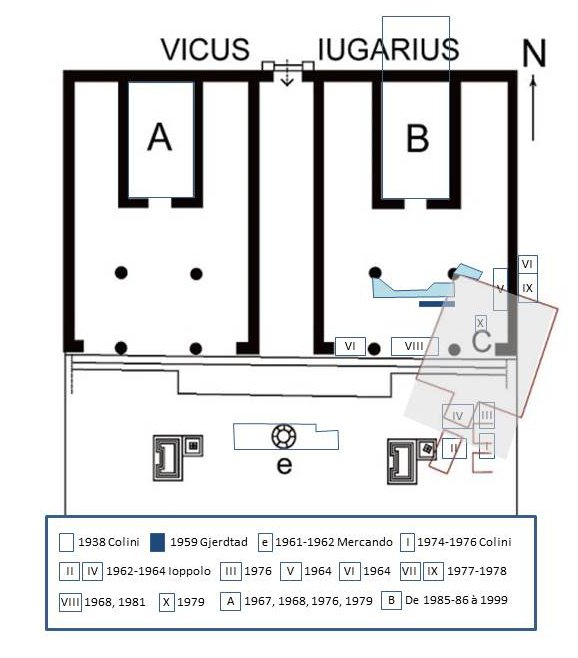 Aire sacrée de Sant'Omobono, diagramme des fouilles et sondages par année